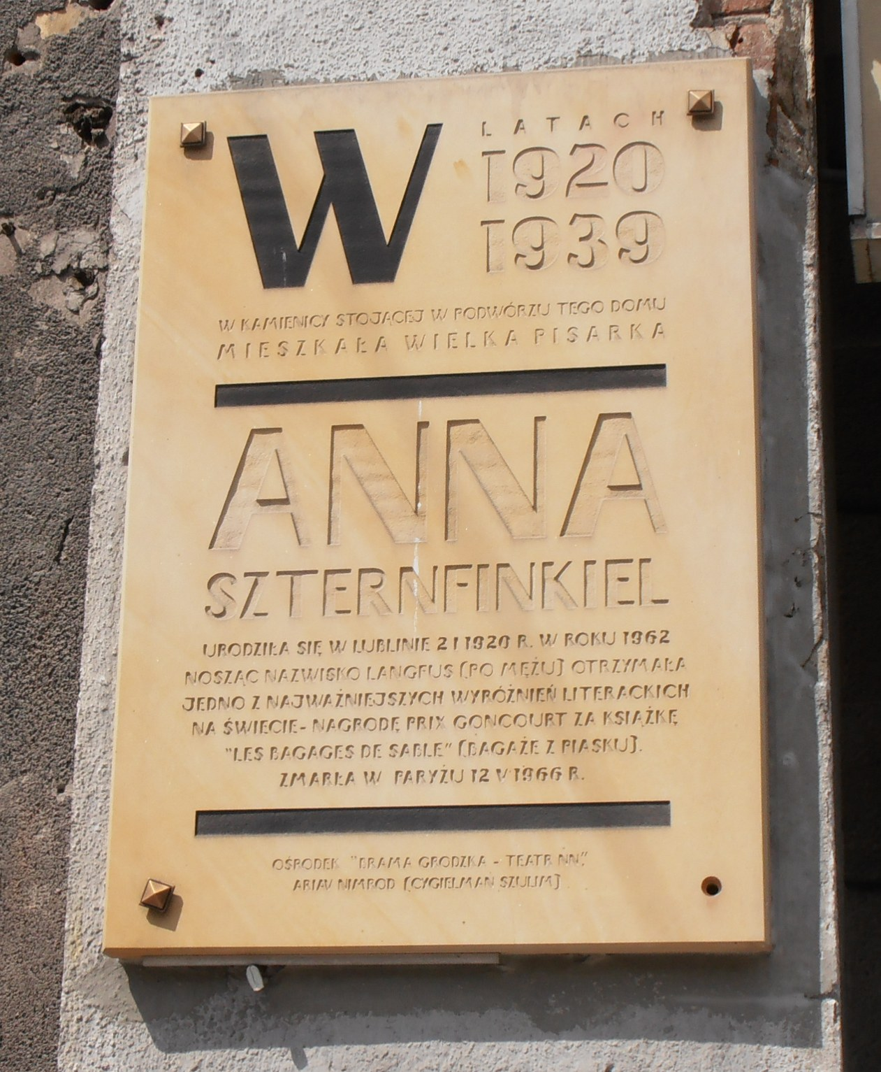 Lublin, ul. Lubartowska 24. Tablica ku czci Anny Szternfinkiel (Anny Langfus), żydowskiej pisarki. Treść: W latach 1920-1939 w kamienicy stojącej w podwórzu tego domu mieszkała wielka pisarka Anna Szternfinkiel. Urodziła się w Lublinie 2.01.1920. W 1962 roku nosząc nazwisko Langfus (po mężu) otrzymała jedno z najważniejszych wyróżnień literackich na świecie – nagrodę Prix Goncourt za książkę "Les Bagages de sable" (Bagaże z piasku). Zmarła w Paryżu 12.05.1966 r. ¦ Ośrodek "Brama Grodzka – Teatr NN". Ariav Nimrod (Cygielman Szulim)